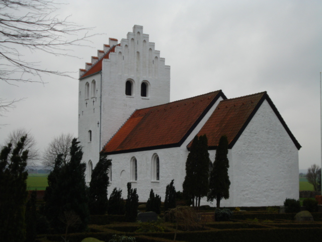 Bjergager Kirke, Bjergager Church, Jutland, Denmark